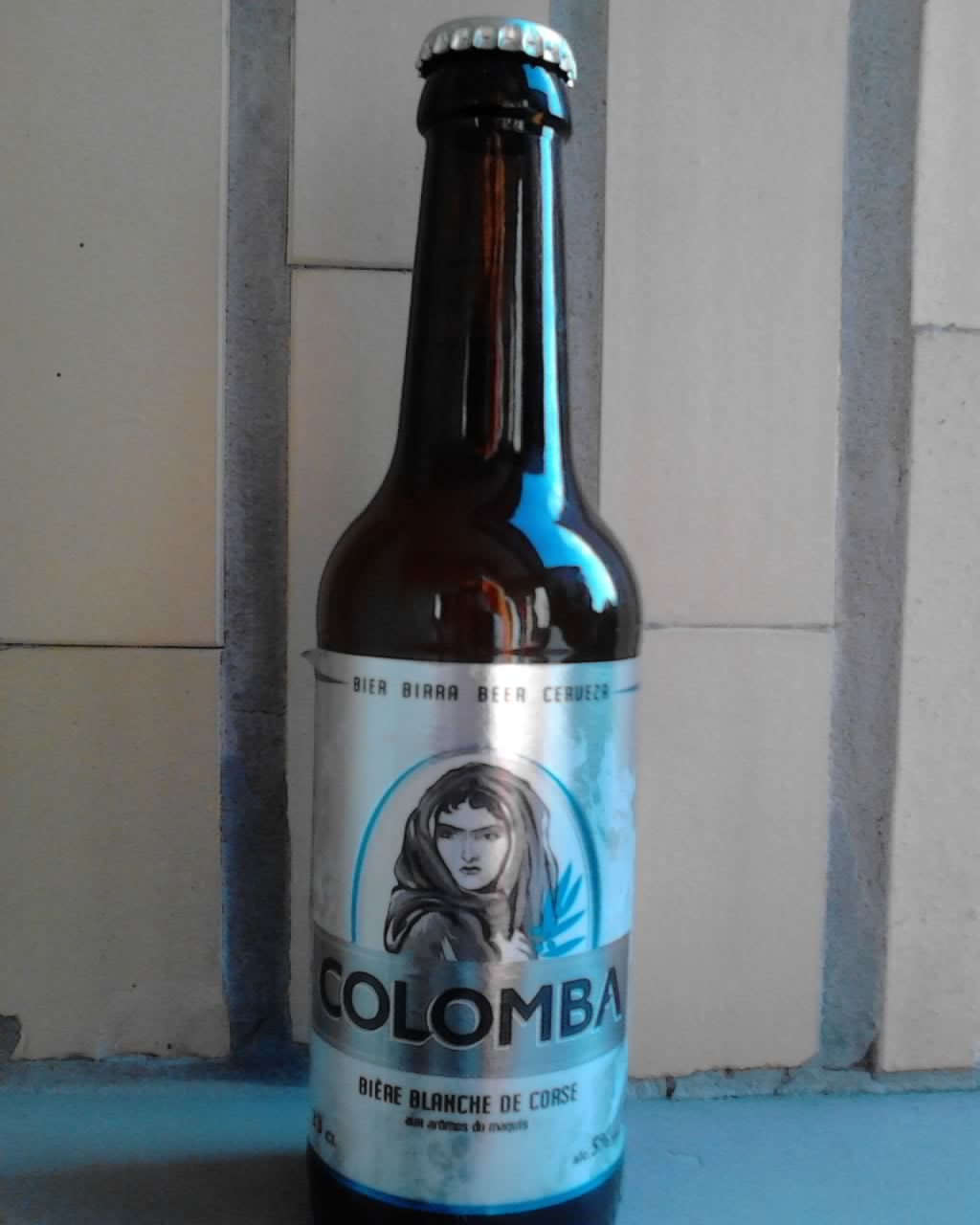 Beer Colomba